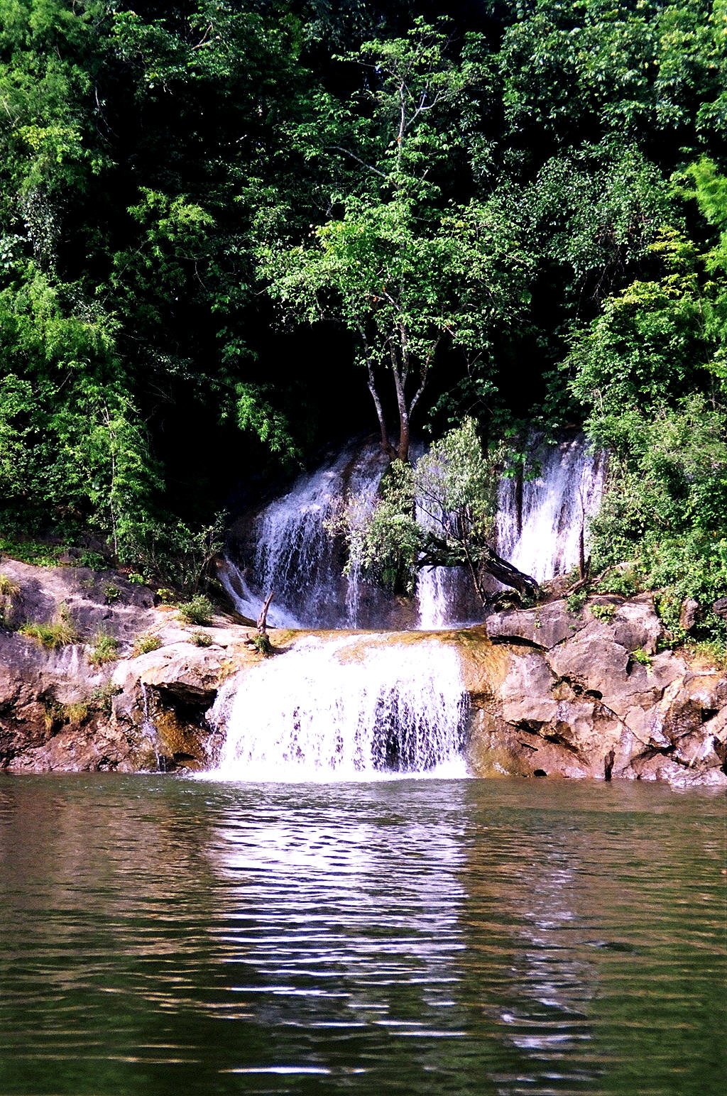 Sai Yok Yai Water fall of Sai Yok NAtional Park, Kanchanaburi, Thailand